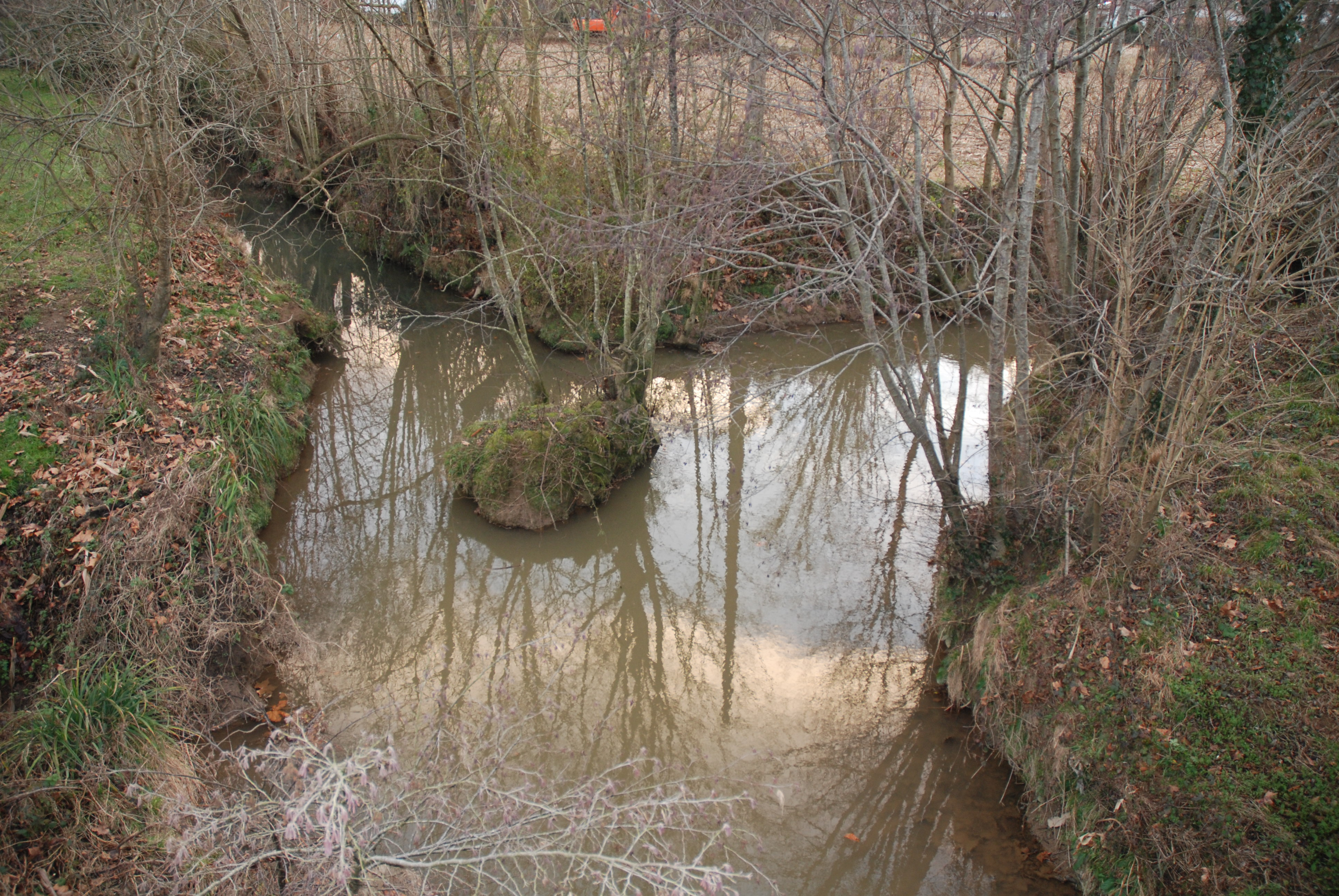 Ahetze, le Besaingo erreka